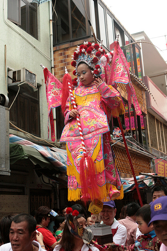 中文（香港）: 香港長洲太平清醮飄色巡遊。